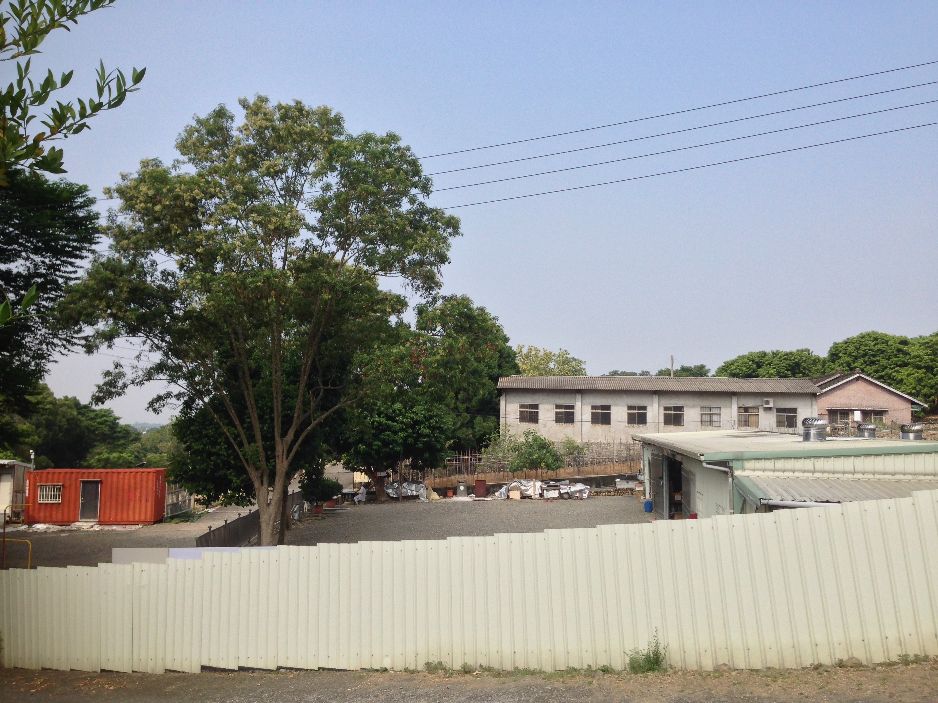 中文（台灣）: 碧雲禪寺臨時處